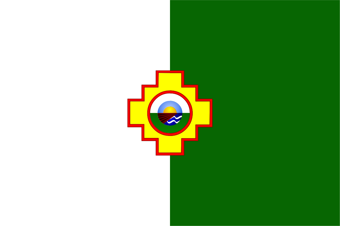 Dsitrito de Acora